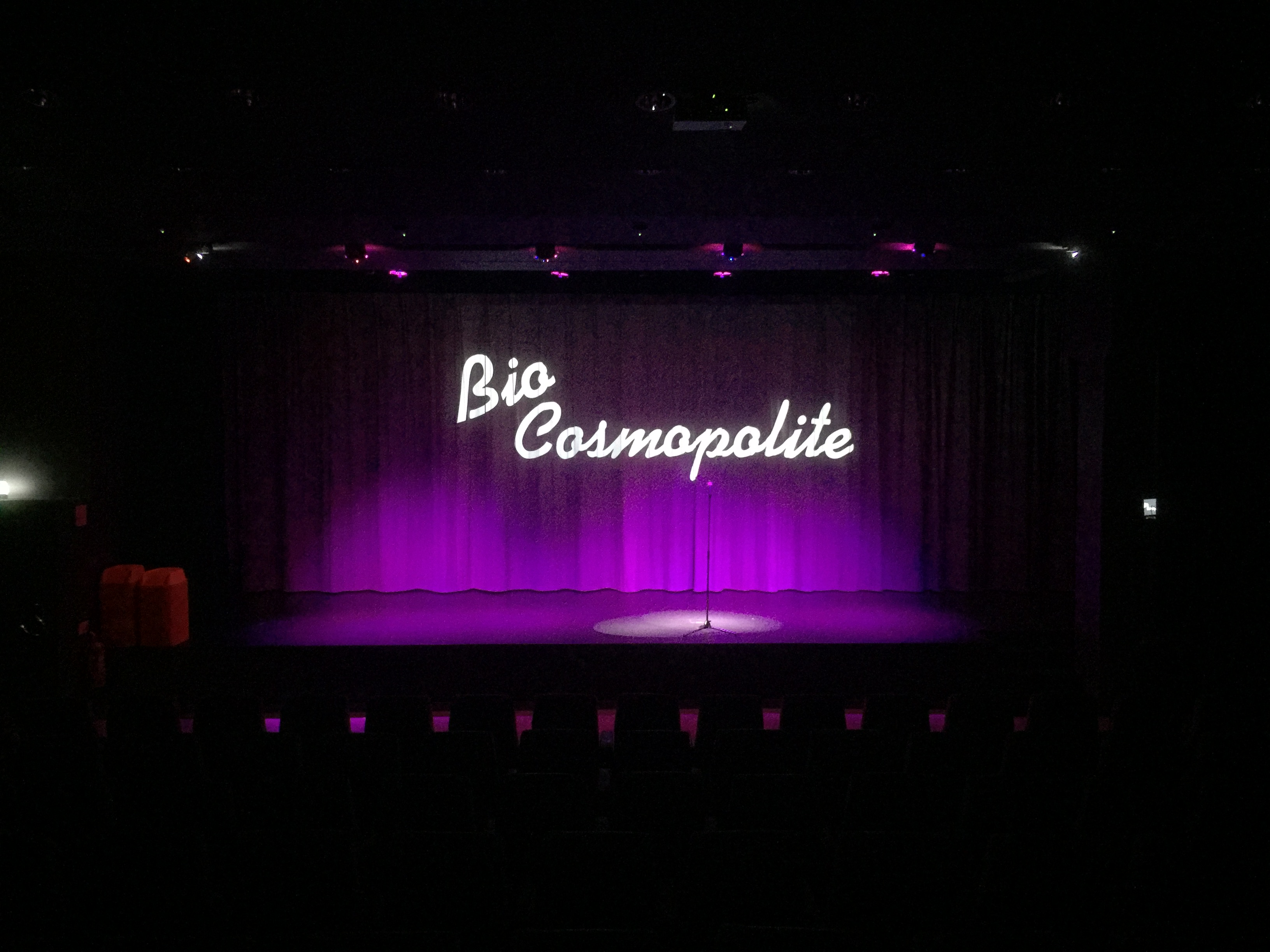 Salongen på Bio Cosmopolite i Brandbergen Centrum under en uthyrning våren 2016.